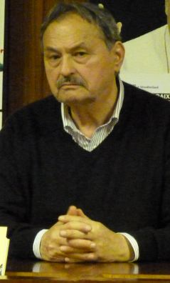 Chrudinák Alajos (Budapest, 1937. március 29. – 2020. március 11.) magyar újságíró, televíziós, a Magyar Televízió külpolitikai műsorainak egykori vezetője, főszerkesztője. A felvétel Budapesten az OKISZ székházban készült.